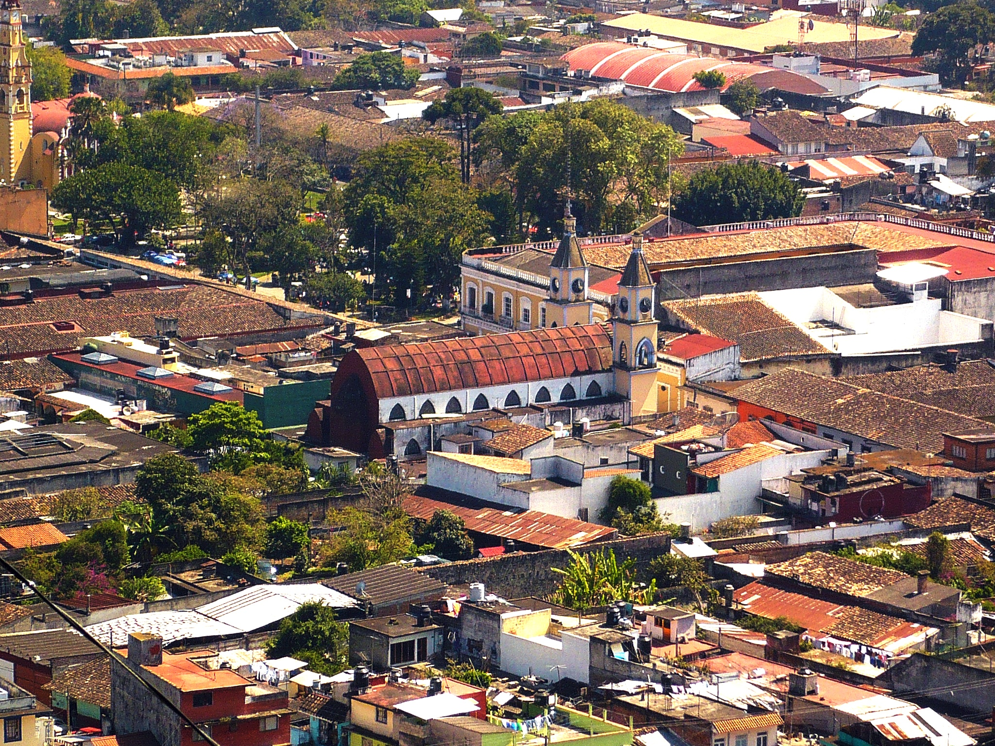 Centro de la ciudad de Coatepec, Veracruz visto desde el Cerro de las Culebras